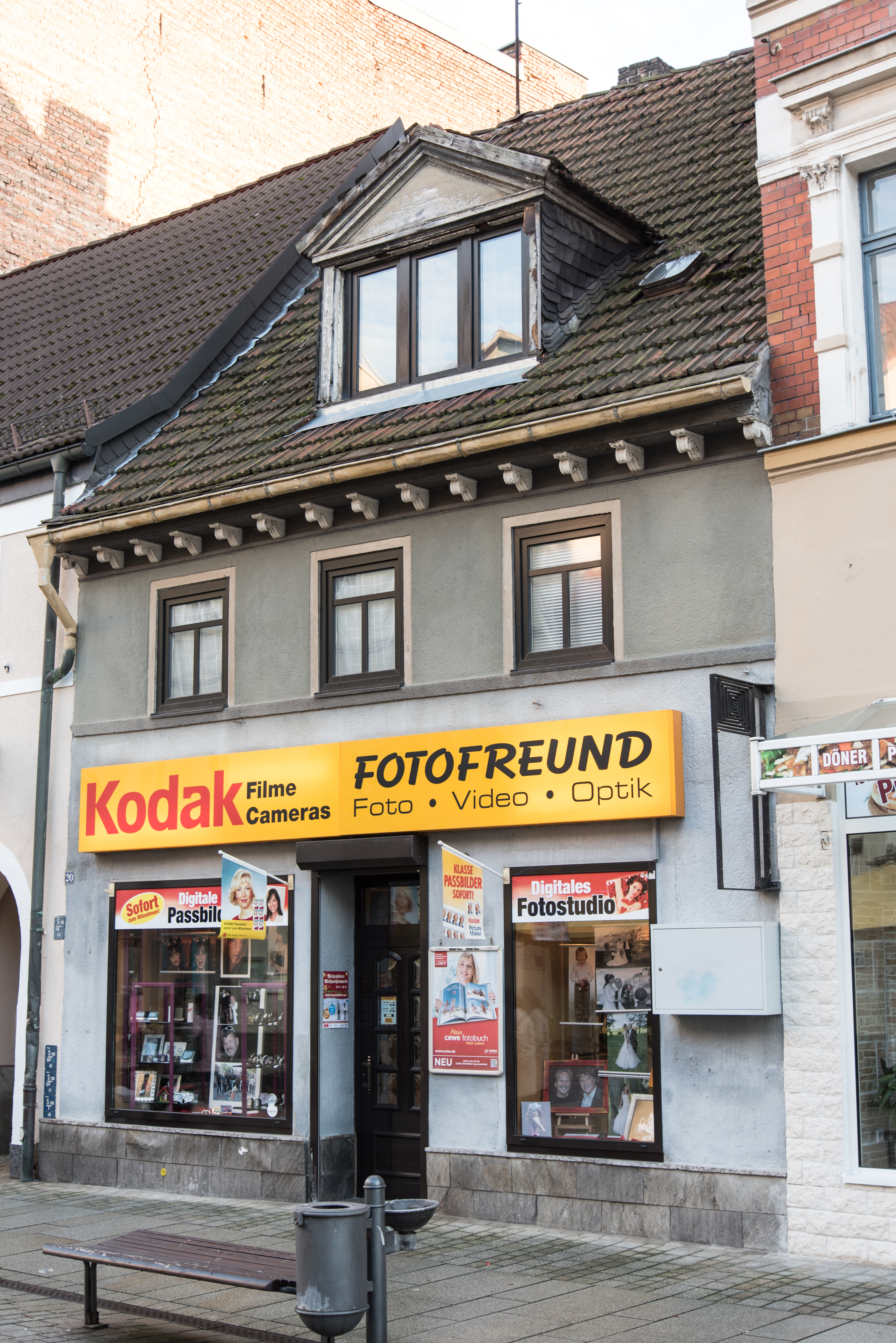 Weißenfels, Jüdenstraße 20